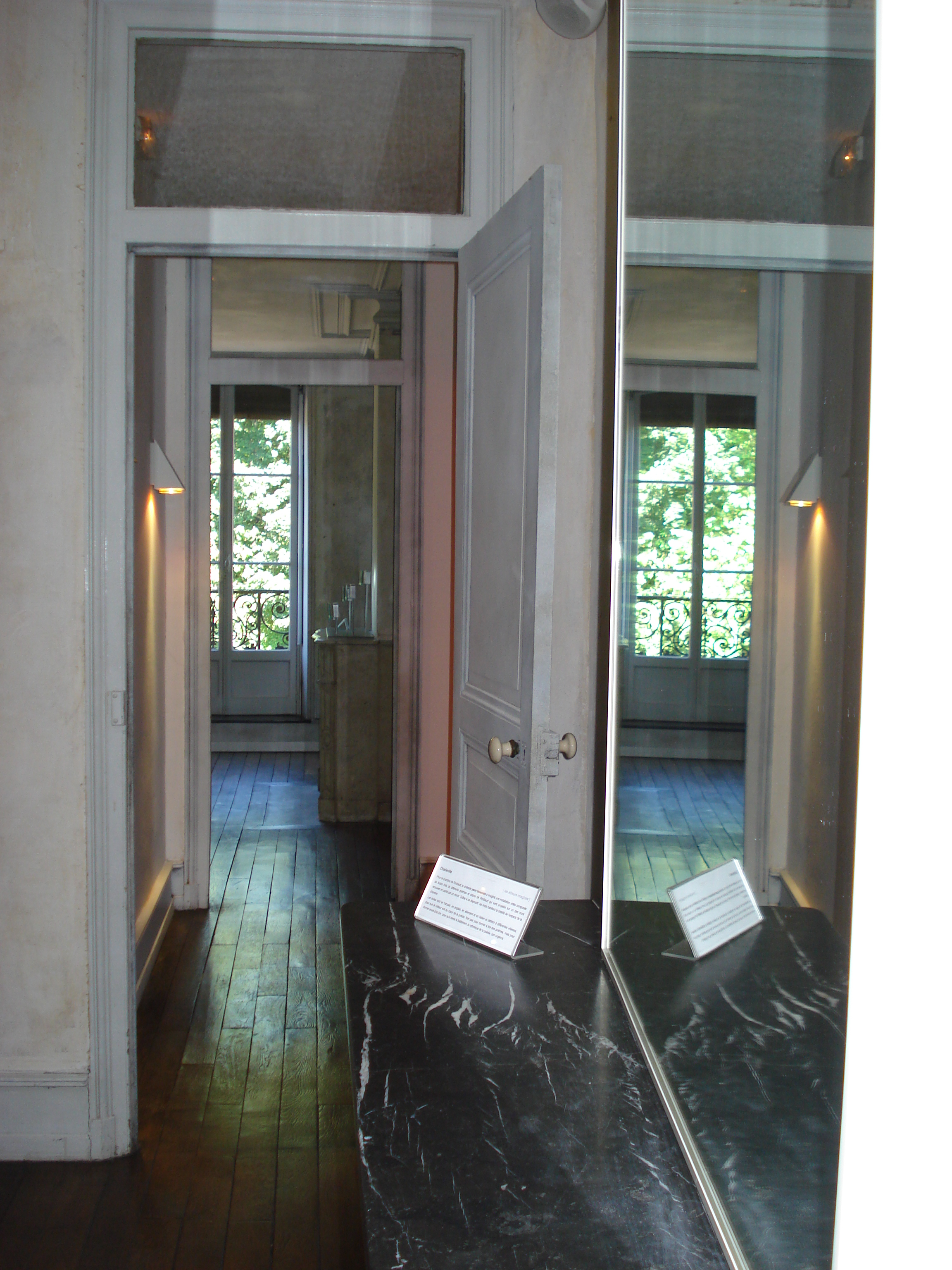 Chambre de Rimbaud à Charleville dans la "maison des Ailleurs".